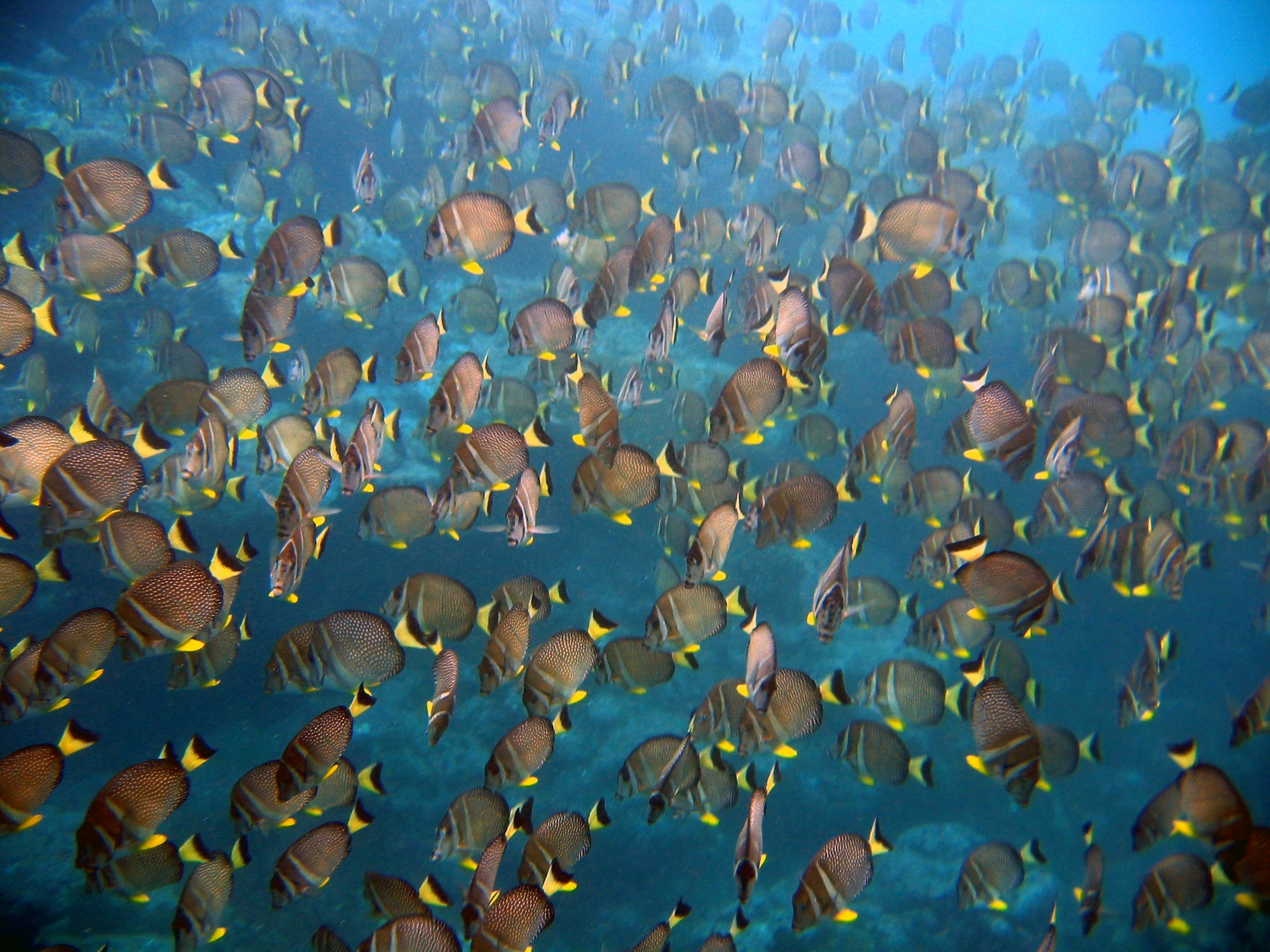 Acanthurus guttatus en el Parque Nacional de Samoa Americana